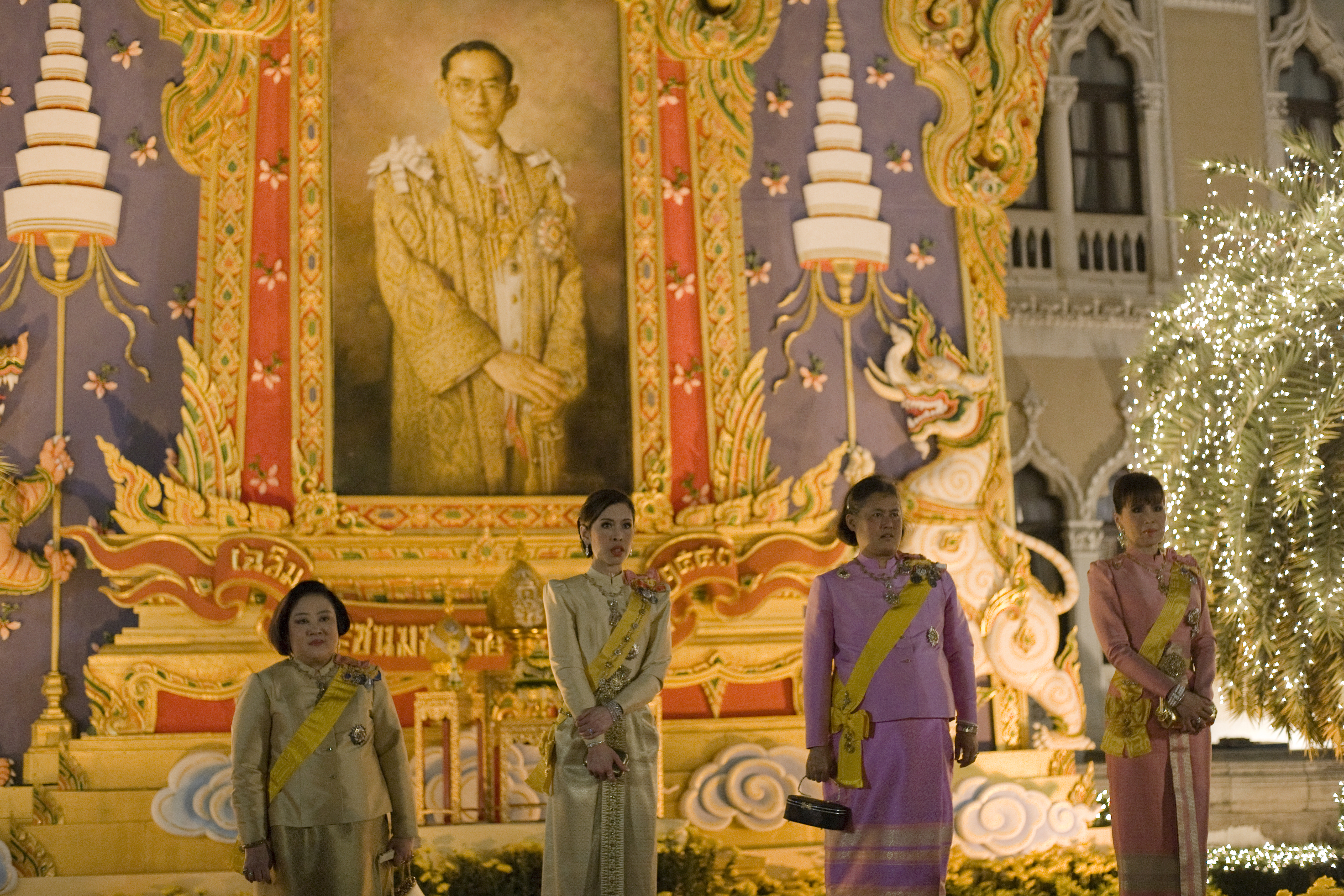 นายกรัฐมนตรี และภริยา เฝ้าฯ รับเสด็จ สมเด็จพระเทพรัตนราชสุดาฯ สยามบรมราชกุมารี เสด็จพระราชดำเนินพร้อมด้วยพระบรมวงศานุวงศ์ในงานสโมสรสันนิบาตเฉลิมพระเกียรติพระบาทสมเด็จพระเจ้าอยู่หัว เนื่องในโอกาสมหามงคลเฉลิม พระเกียรติพระชนมพรรษา วันอังคารที่ 7 ธันวาคม พ.ศ.2553 (Photographer attached to the Prime Minister of the Kingdom of Thailand : Peerapat Wimolrungkarat / พีรพัฒน์ วิมลรังครัตน์) @is50mm